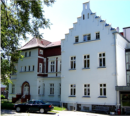 Ehemaliges Gutshaus im Ortsteil Gommern-Wahlitz Fotograf: Muggmag Datum: 6/2006